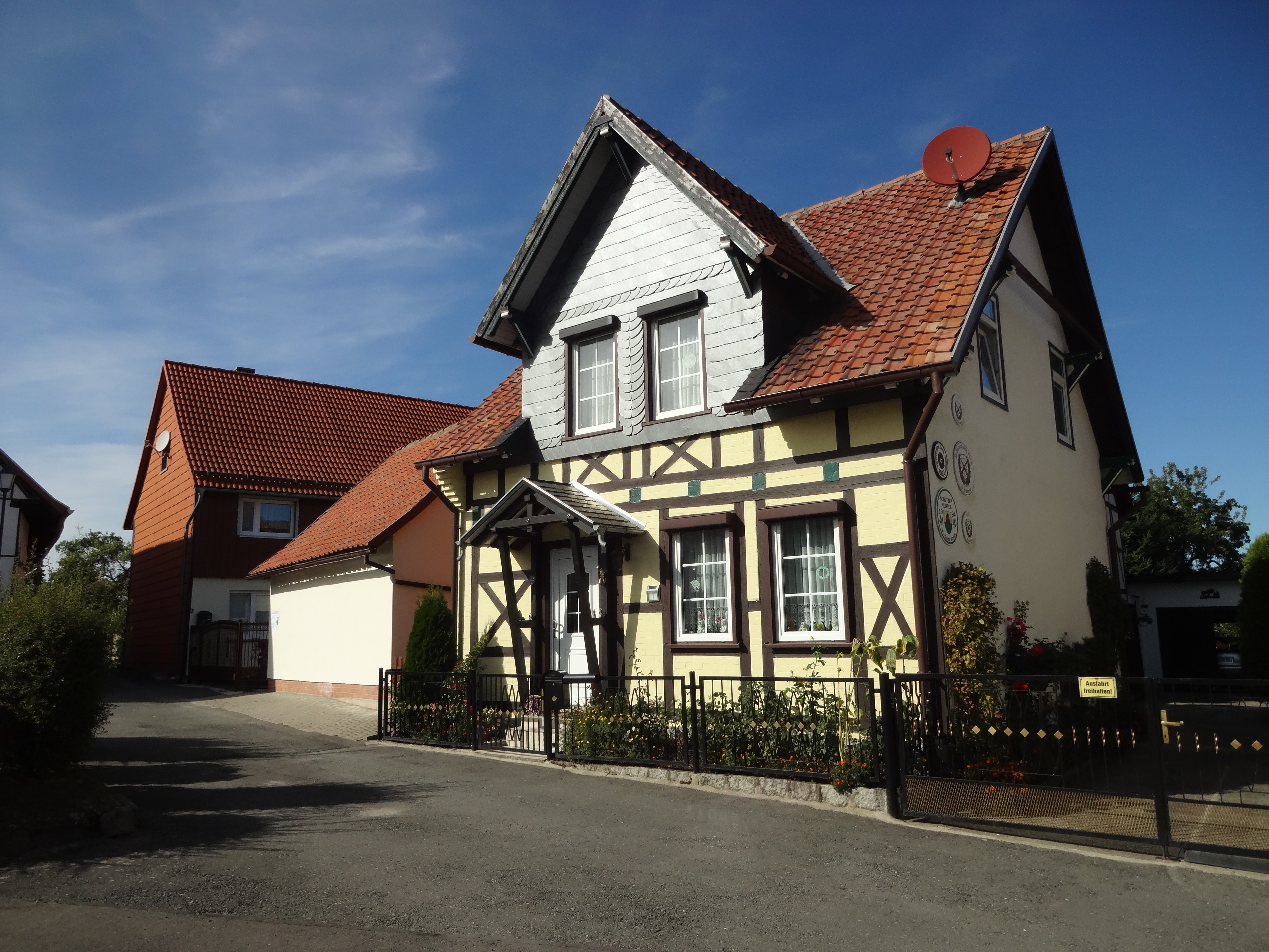 ehemalig denkmalgeschützter Straßenzug Schmiedestraße 1, 2, 2a, 3 - 11 in Drübeck